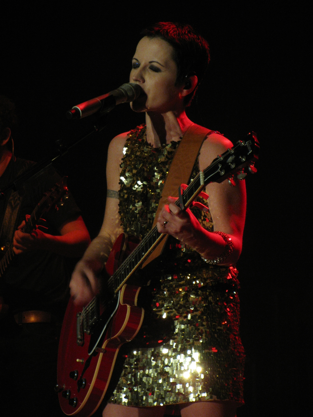 2009 Montreal, QC